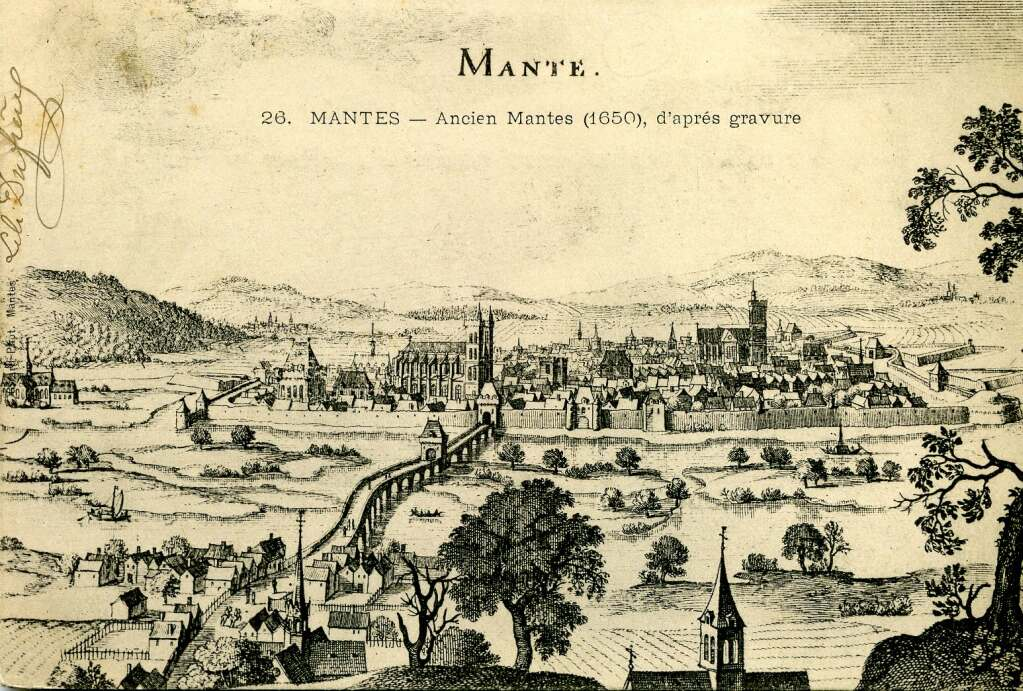 Vue de Mantes en 1650 selon une gravure ancienne publiée dans "Topographiae Galliae". Carte postale ancienne (postée en 1903).